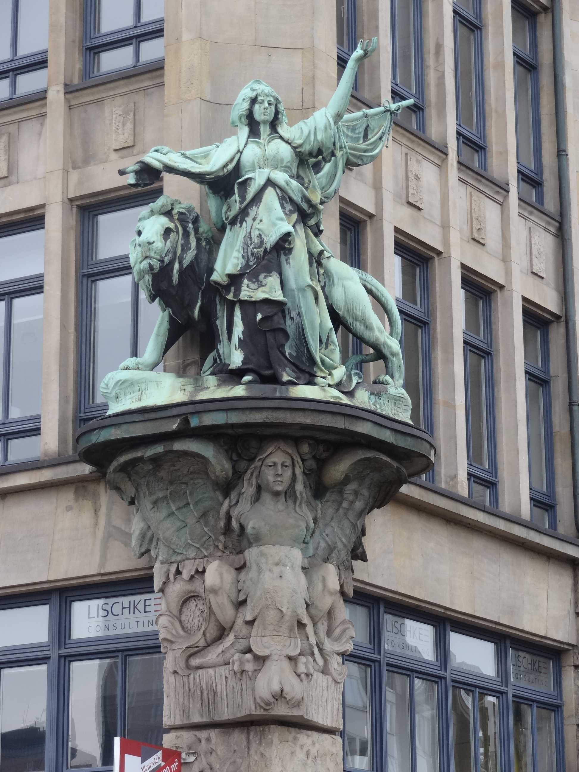 Haus der Seefahrt (Hamburg), Skulptur